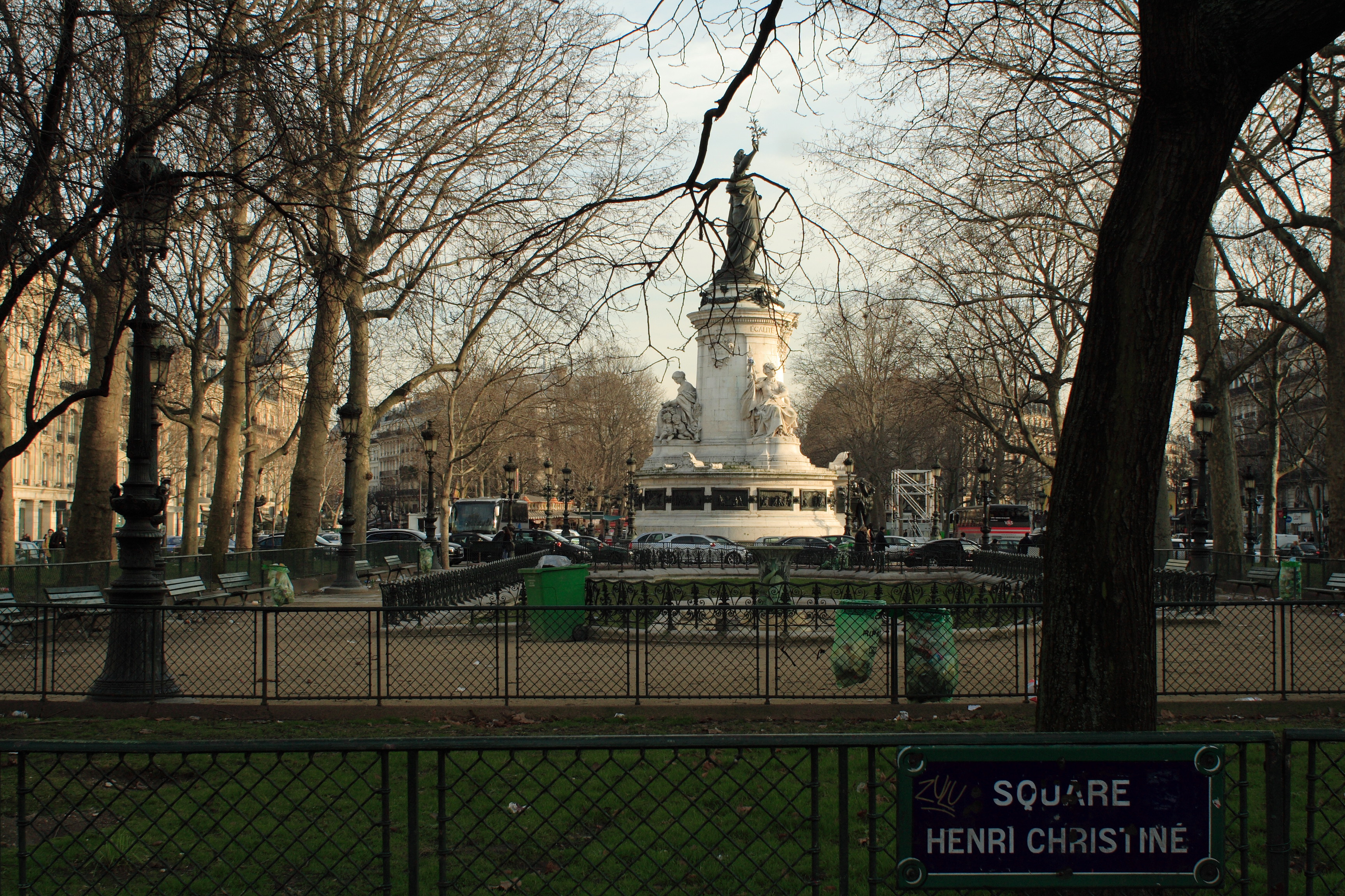 Square Henri-Christiné, au milieu de la place de la République (Paris).